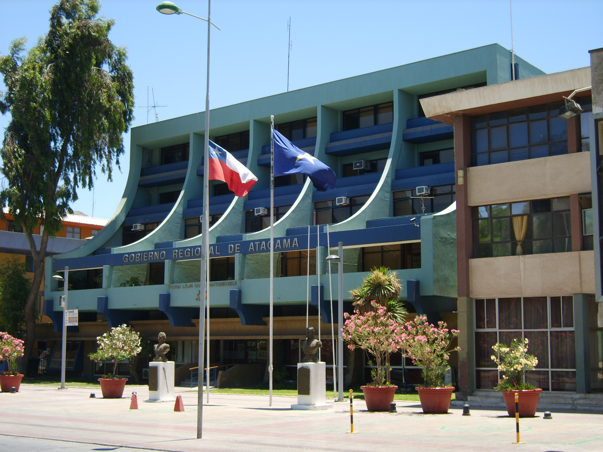 Edificio de la Intendencia Regional de Atacama en Copiapó, Chile.